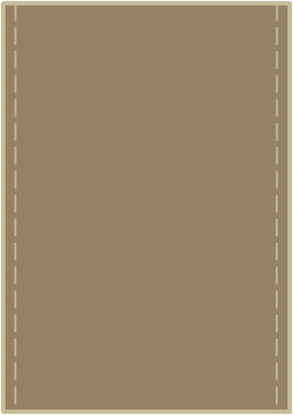 Saudi Arabian military ranks (Private). جندي